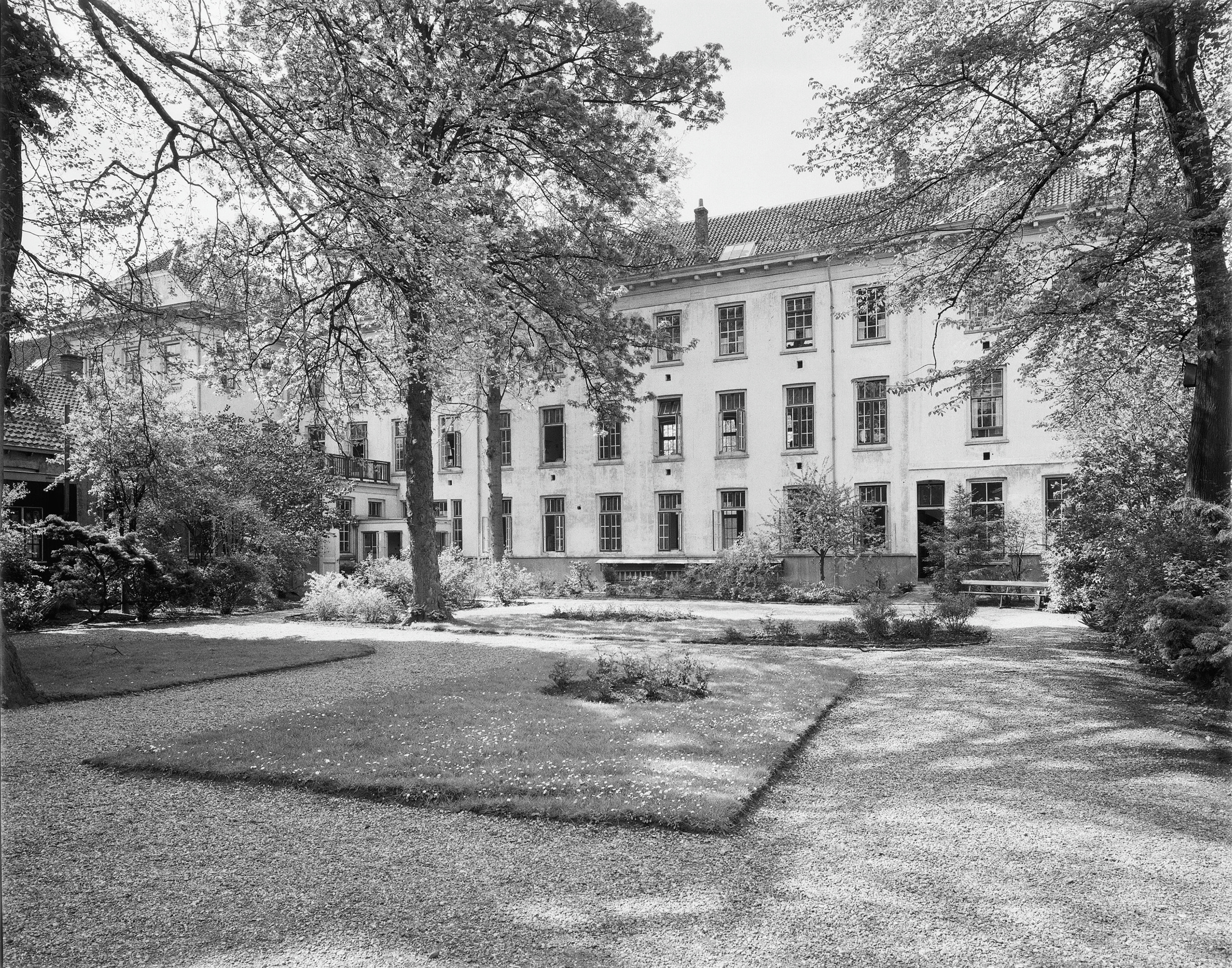 Militair Hospitaal: hospitaal This is a possible Rijksmonument:Find the monument in the Monuments database:Bolwerk in UtrechtAll Rijksmonumenten in UtrechtIs this a Rijksmonument?YesNoMore information about this project and help. More images to work at in Category:Possible Rijksmonumenten.